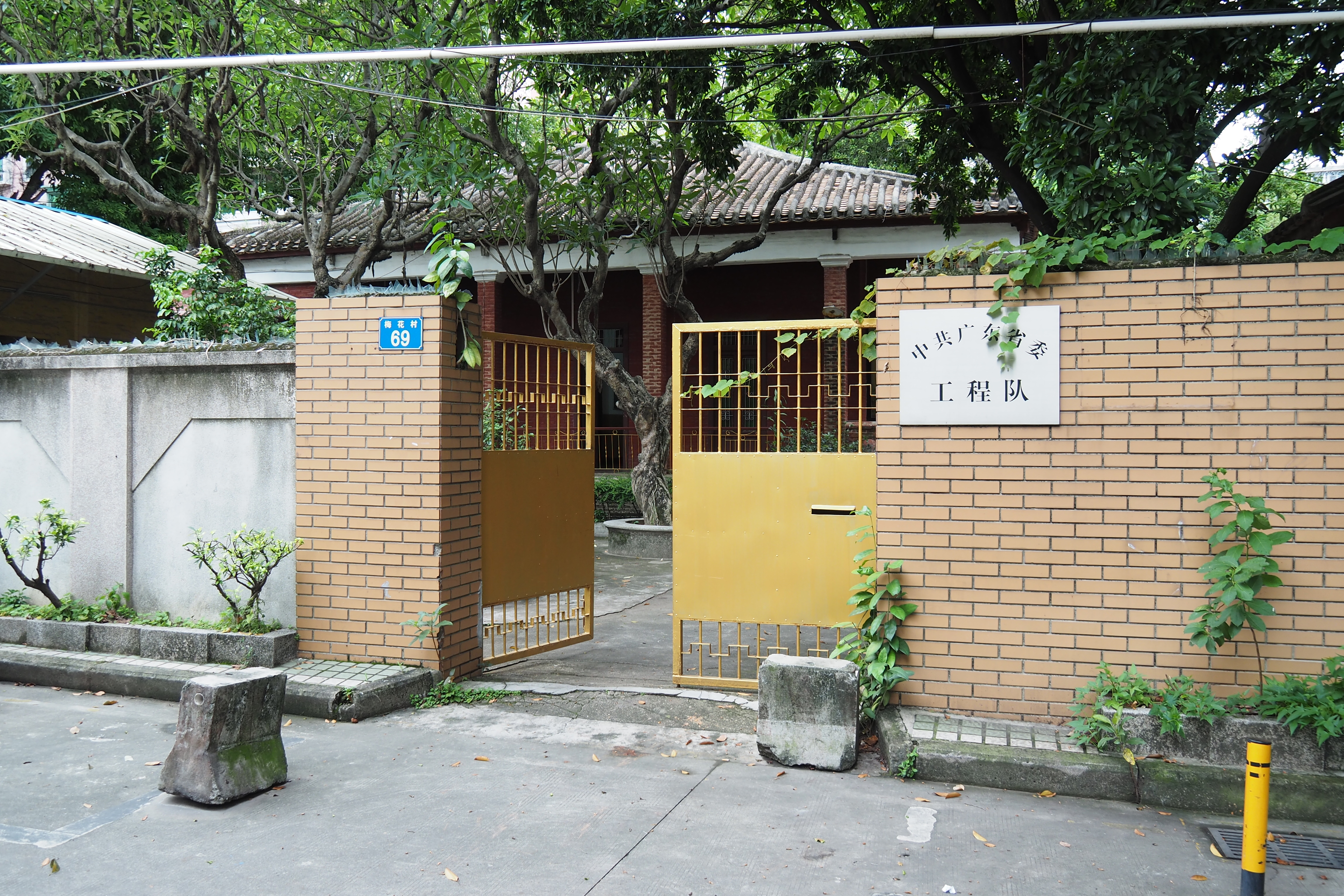 中文（中国大陆）: 位于广东省广州市越秀区中山一路梅花村69号。